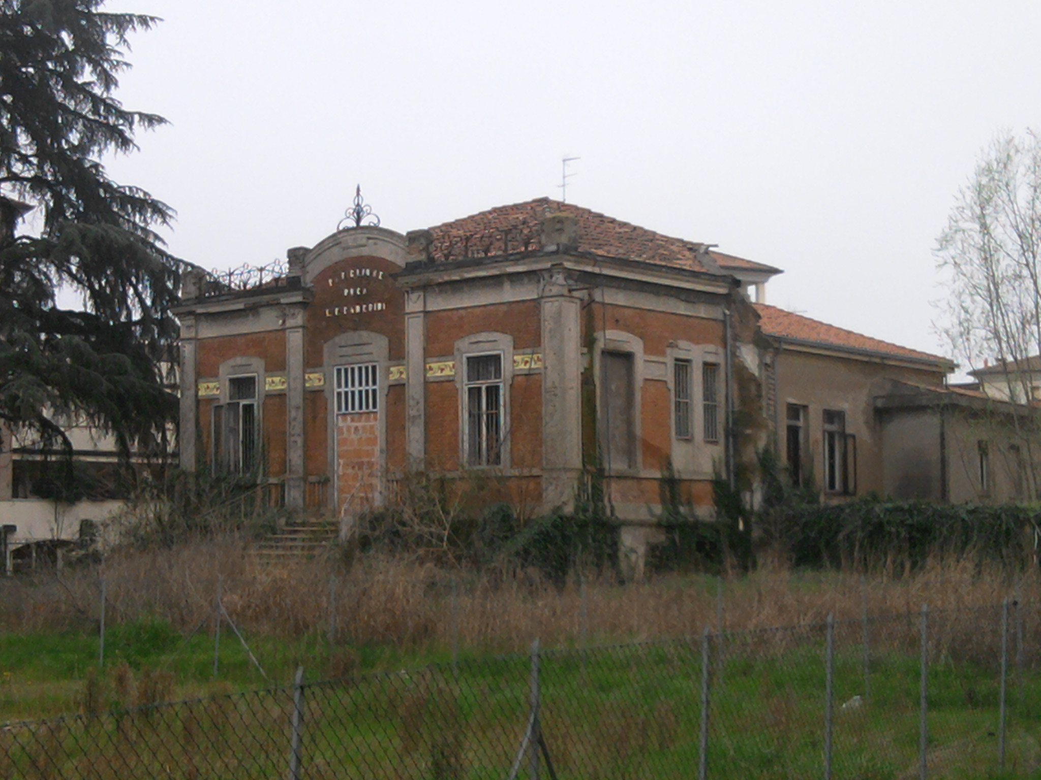 Rovigo, strutture del vecchio ospedale Santa Maria della Misericordia. Il padiglione Duca Camerini.